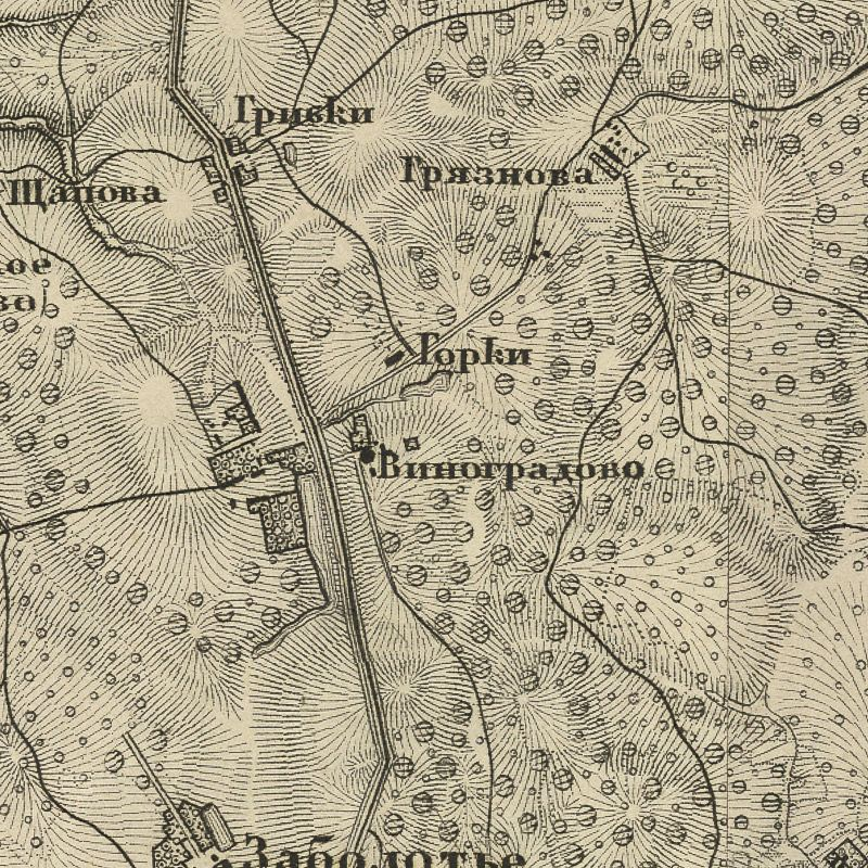 Село Виноградово Мытищинского района Московской области на карте Московской губернии Ф. Ф. Шуберта